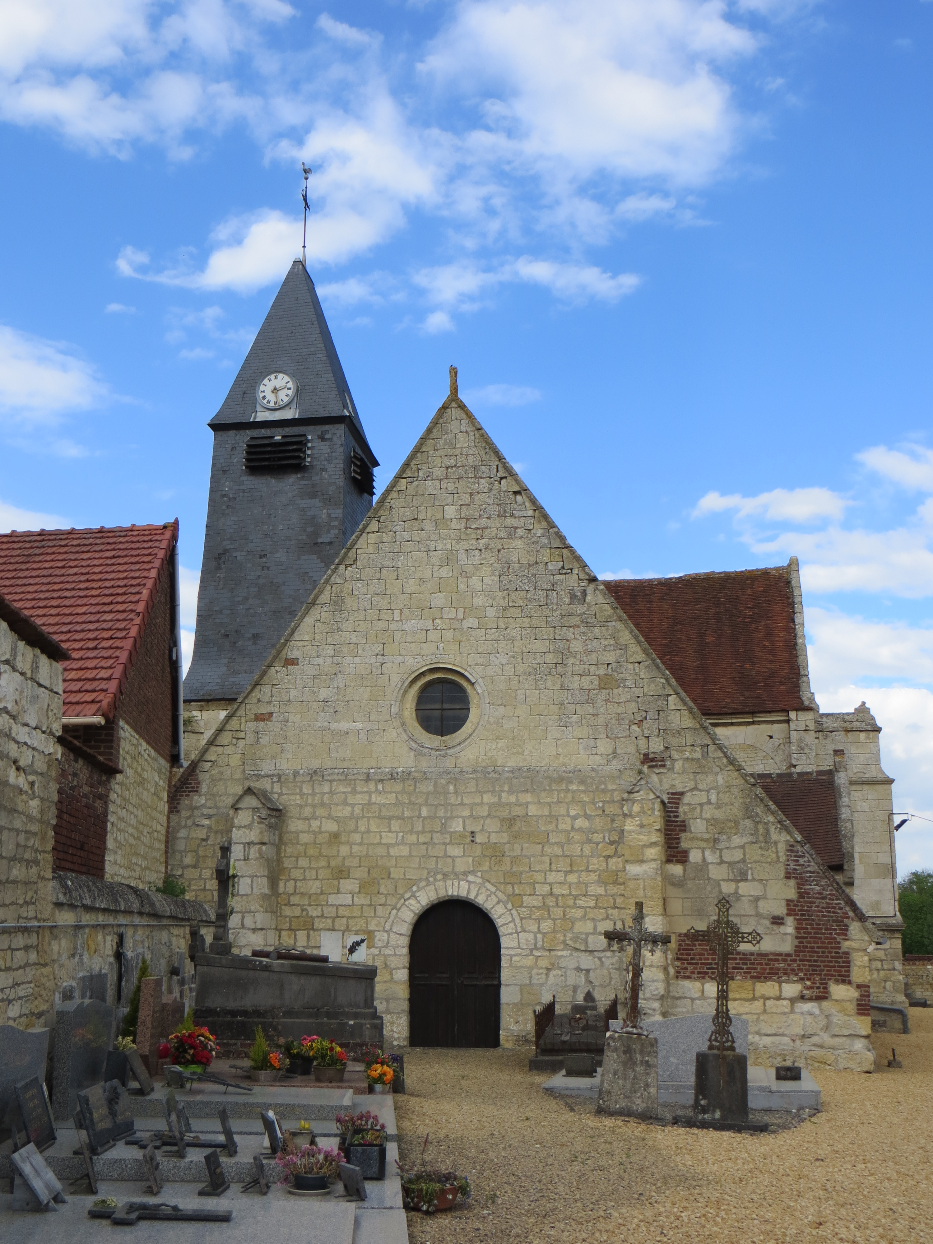 Vue générale de l'église